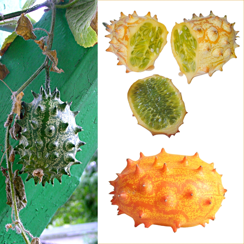 Grafika podręcznika Wikijunior:Owoce. Kiwano (Cucumis metuliferus).